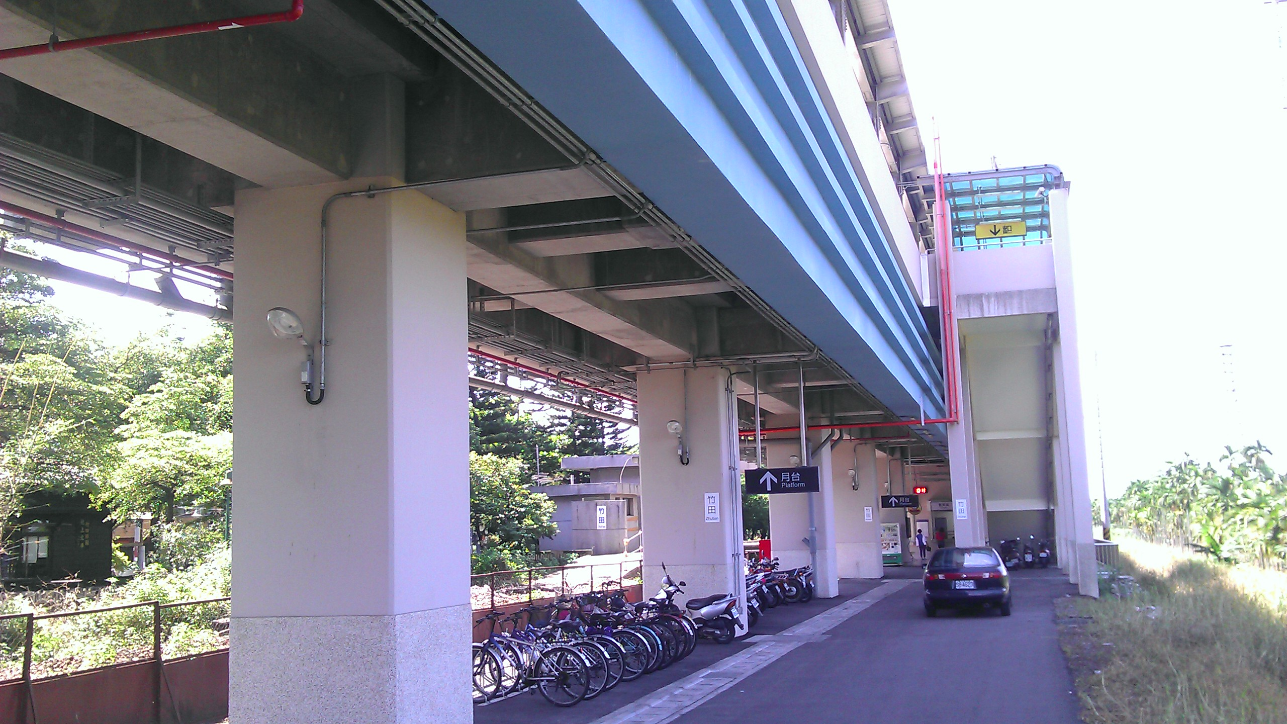 於公元二〇一三年六月二十五日（2013-6-25）啟用，並配合鐵路高架化的竹田車站新址。